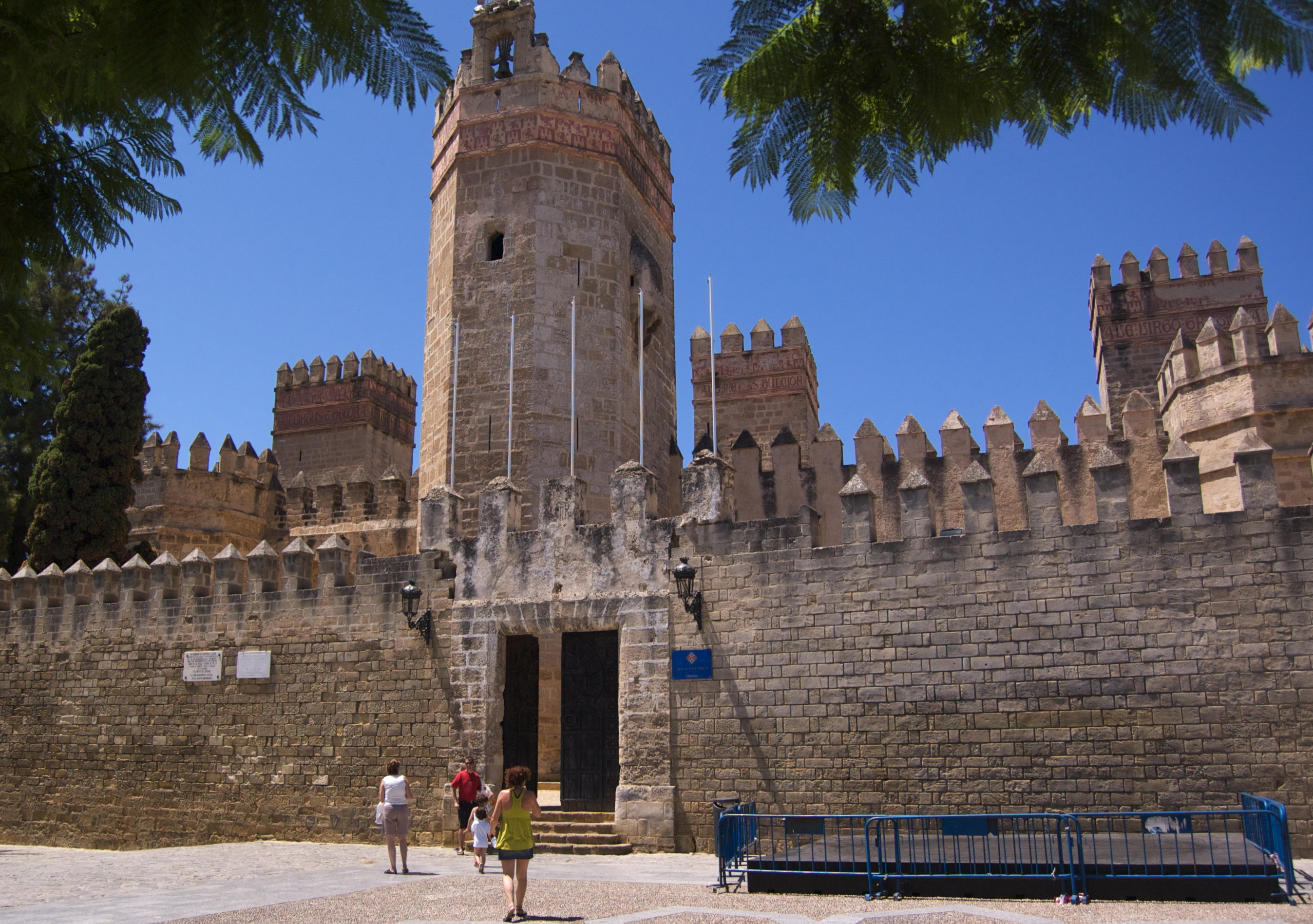 Frontal view of the Castillo de San Marcos de El Puerto de Santa María, Cádiz, Spain.